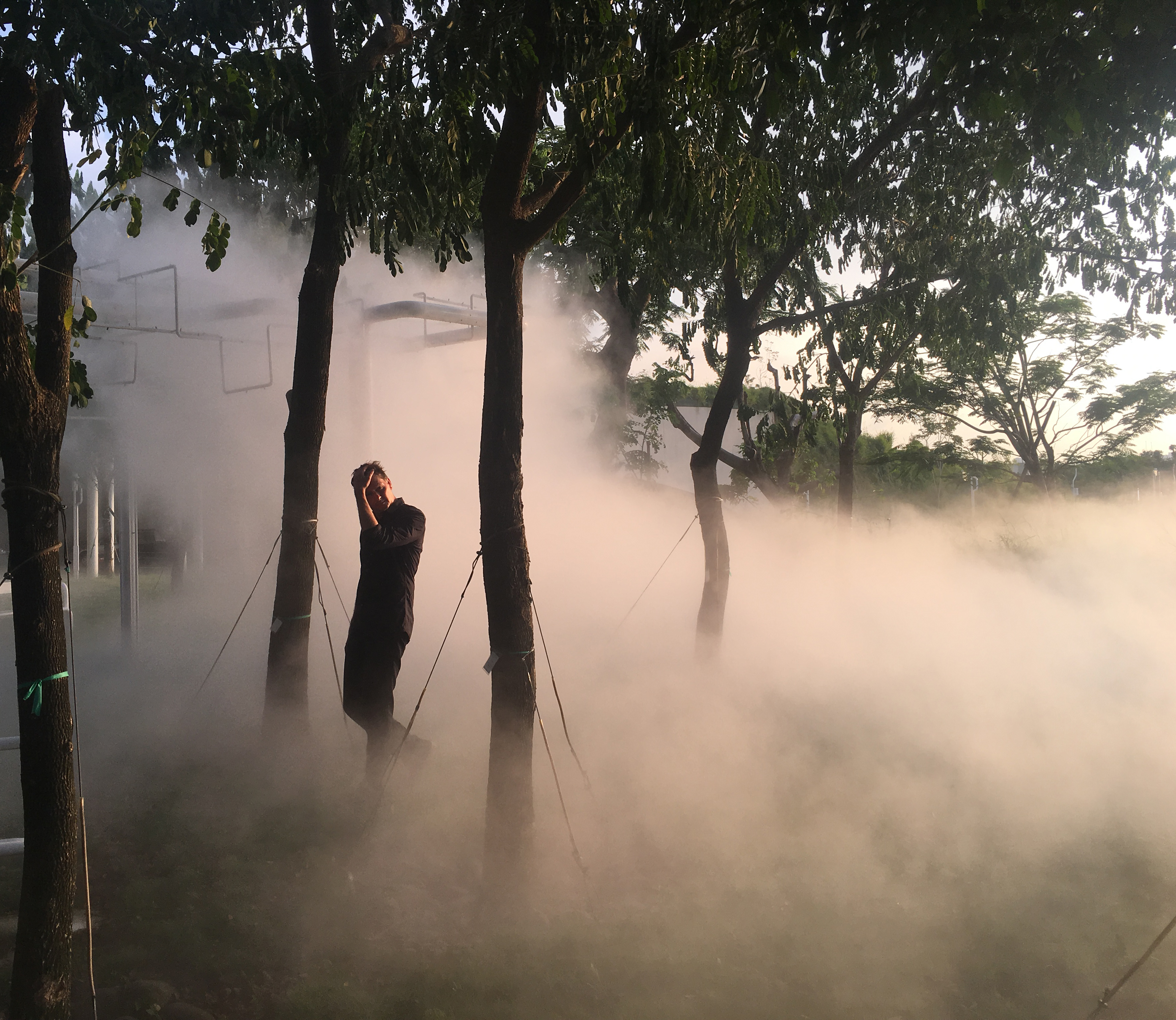 Philippe Rahm dans le Jardin Météorologique du Parc Central (台中中央公園) de Taichung, Taiwan